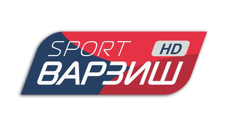 Тоҷикӣ: Логотипи телешабакаи Варзиш ТВ